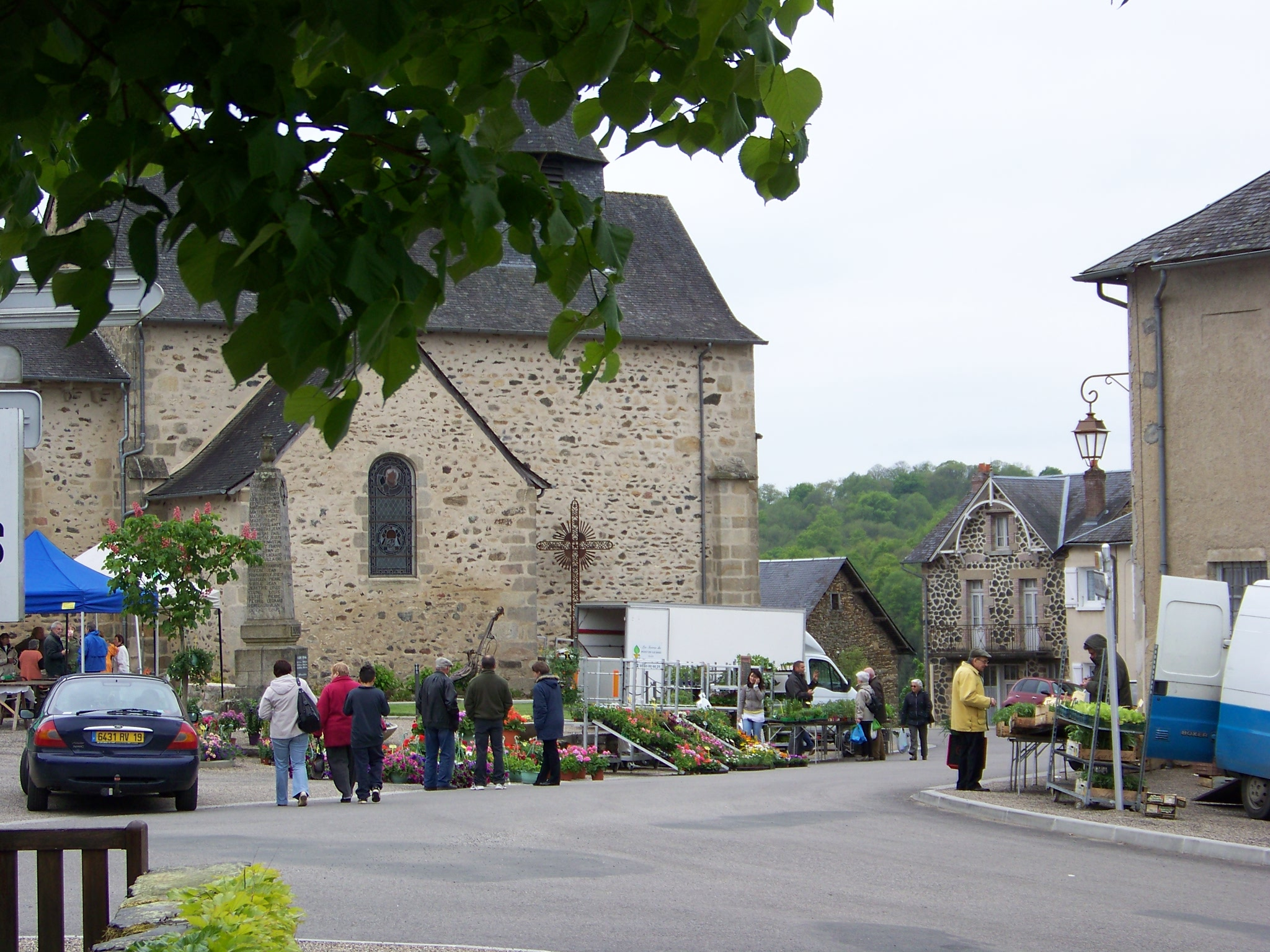 Condat sur Ganaveix : foire aux plants sur la place de l'église